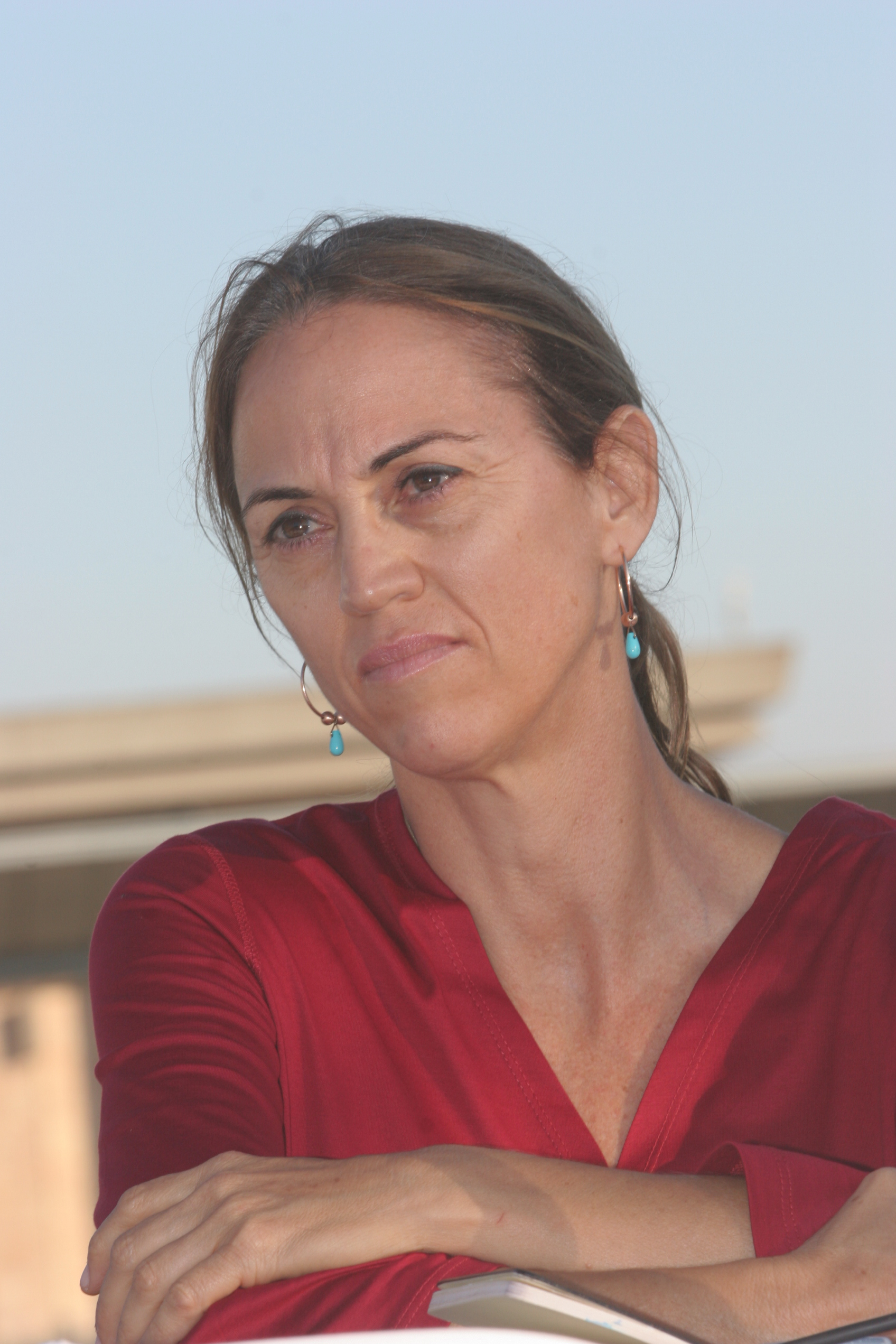 לבקשת צחי לרנר. הזכויות שמורות לרות קלדרון